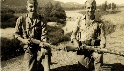 Soldats bunyolins armats